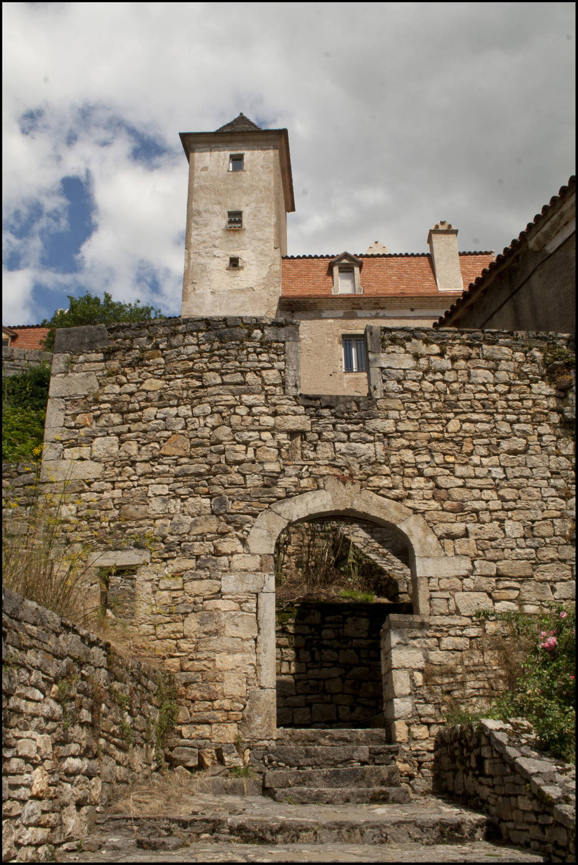 Castrum de Larnagol (Inscrit) .